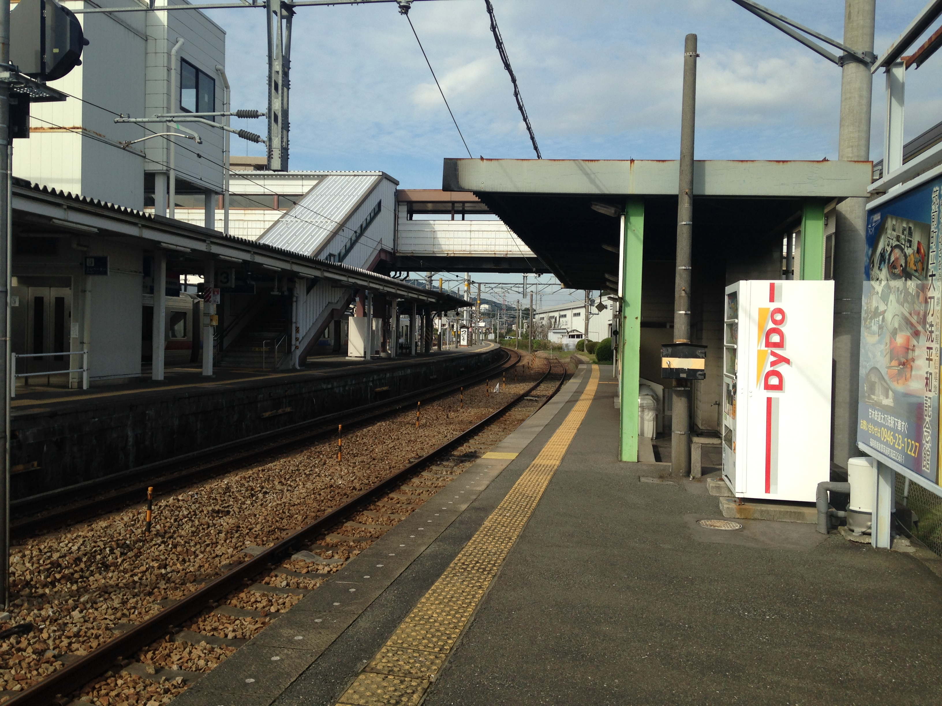 基山駅(甘木鉄道)のホーム。左側はJRのホーム